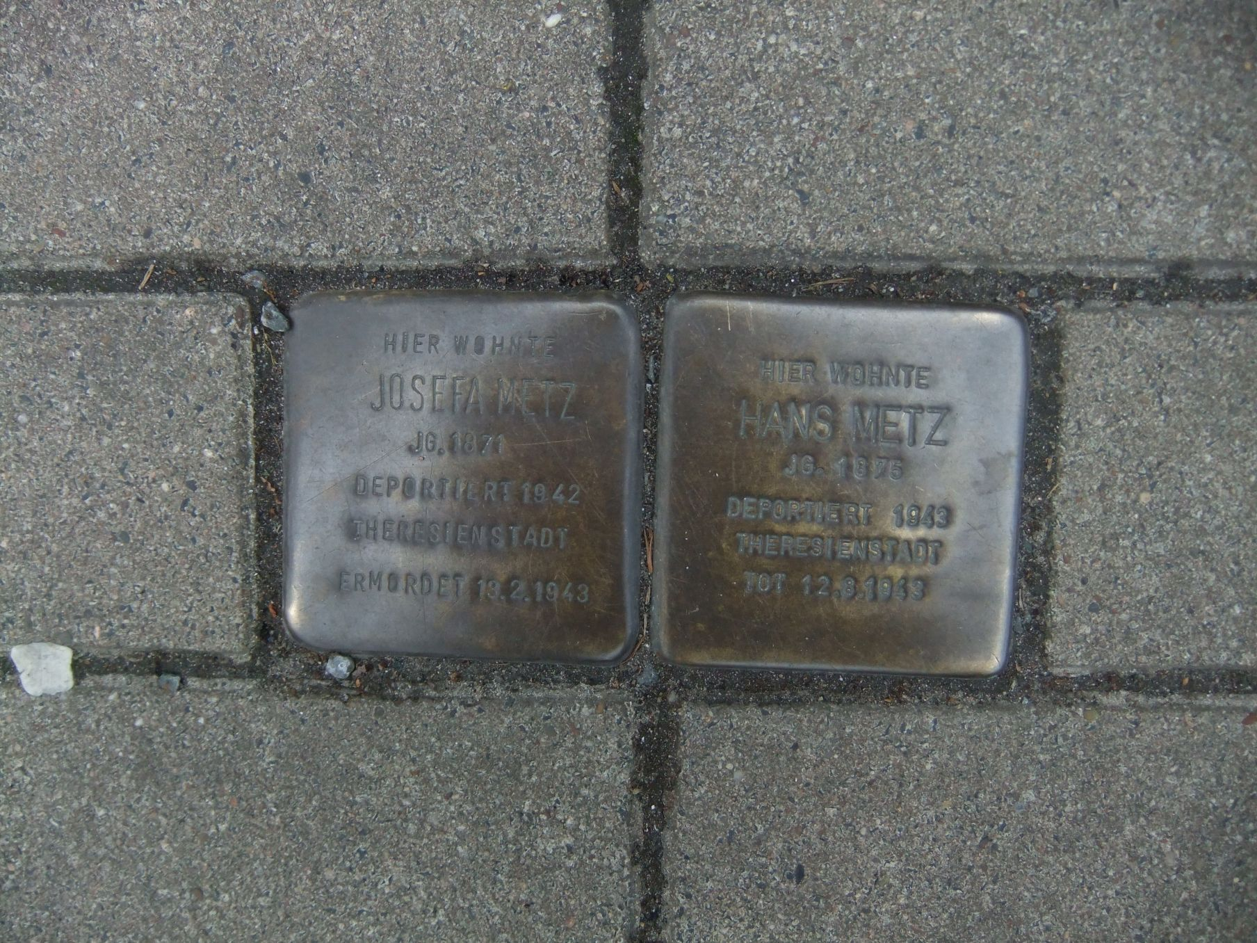 Stolpersteine Kreuzstraße 1 Bielefeld. Die Steine erinnern an Familie Metz. Kreuzstraße 1 ist die heutige Anschrift. Ehemals hieß die Anschrift Detmolder Straße 4.